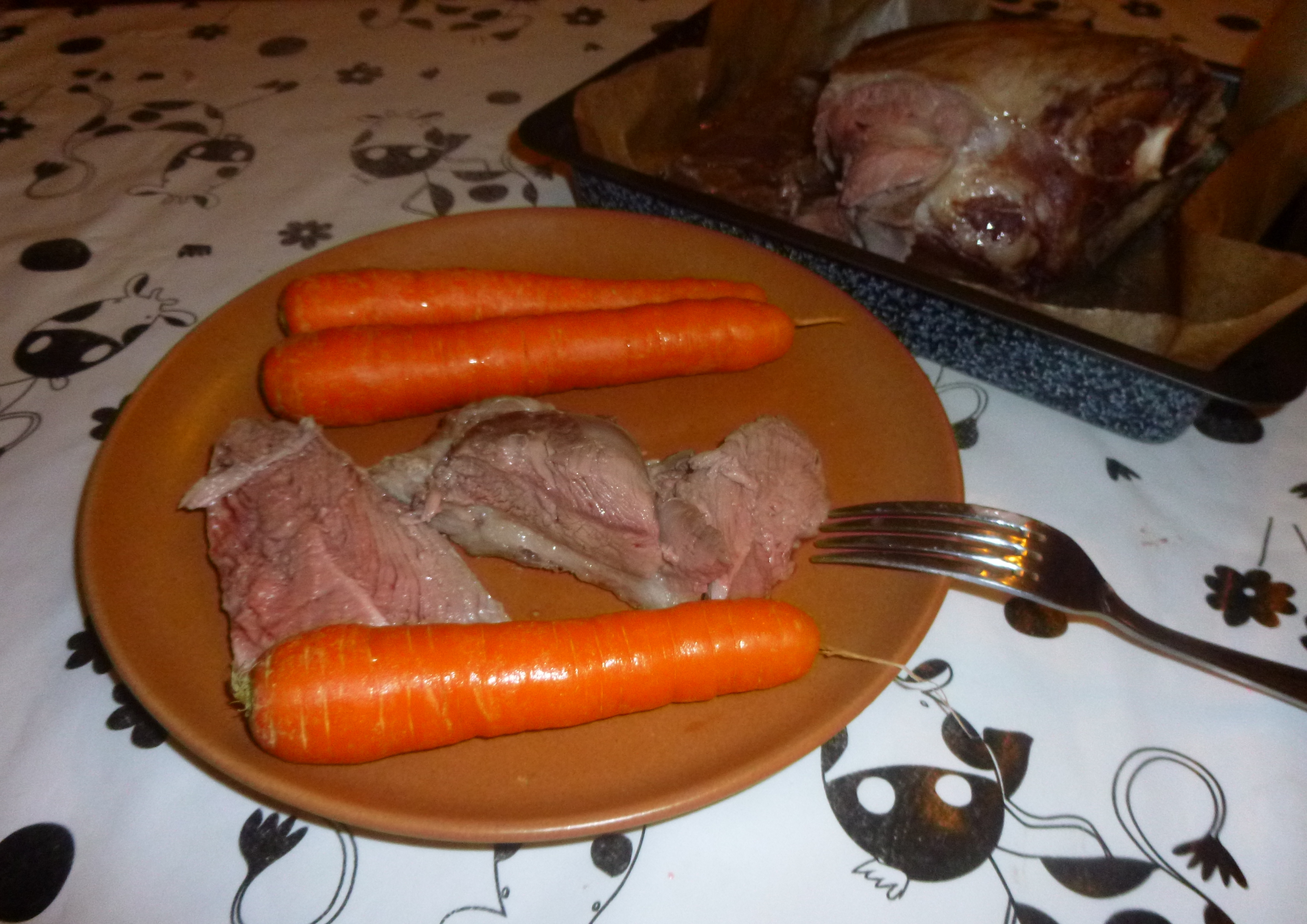 Recette paléo - Agneau Saint George nourrie à l'herbe. Rôti au four. Carottes crues.